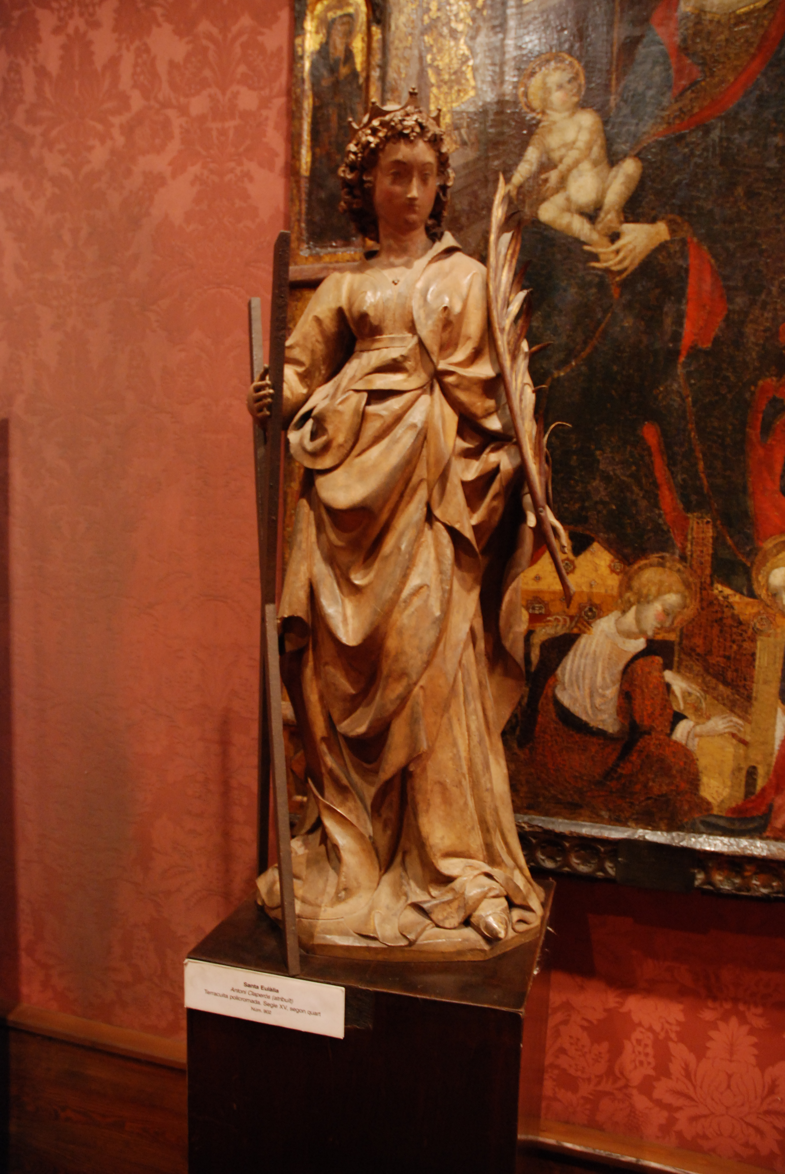 Eulalia van Barcelona (niet van Mérida) in de schatkamer van de kathedraal van Barcelona, Spanje; sculpt. Antoni Claperós, ca. 1430